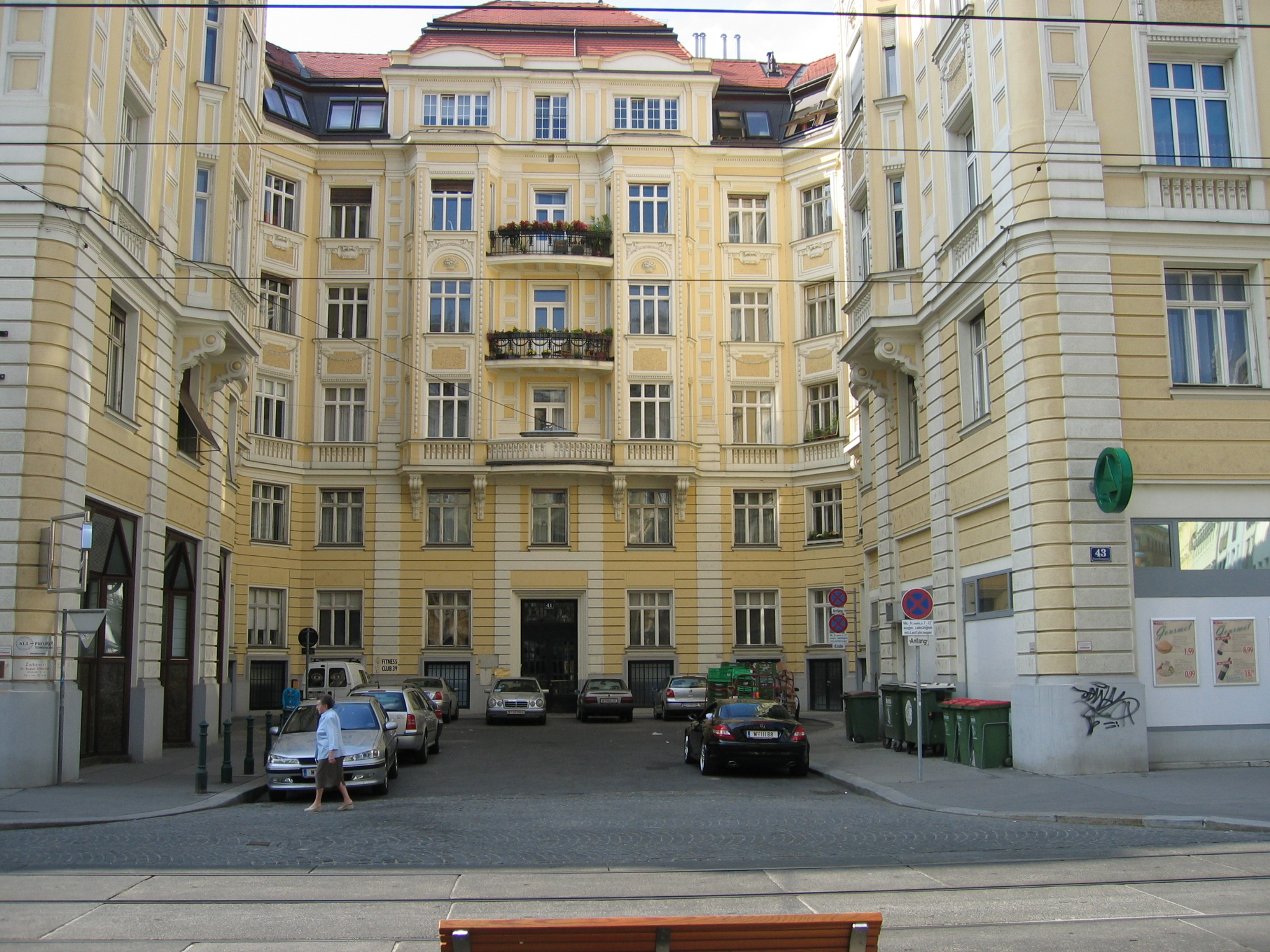 Die an die Wiener Porzellangasse angrenzende Einbuchtung zwischen den von Hugo Mandeltort geplanten Häusern Porzellangasse 39, 41 und 43 diente in der warmen Jahreszeit dem Café Koralle als Schanigarten. Heute wird sie ganzjährig als Parkplatz genutzt. Das Haus Porzellangasse 39-43 wäre auch ohne seine bekannten Bewohner: Meta Menz, Hermann Nunberg und Susi Weigel (Porzellangasse 39), Franz von Zülow (Porzellangasse 41) und Adolf Josef Storfer (Porzellangasse 43) einen eigenen Artikel wert. siehe z.B.: Alfred Wolfs 9 Wege im 9.: "Gegenüber der Abzweigung der Pramergasse ist PORZELLANGASSE 39-43 der Straßenhof aus den Jahren 1912/13 nicht zu übersehen. Er ist (wie auch Porzellangasse 9) ein Werk des Architekten Hugo Manhardt (eigentlich Mandeltort). Er baute im Mischstil aus barocken und secessionistischen Schmuckelementen. Bei - wie hier - großen, aus mehreren Parzellen bestehenden Baukomplexen wählte er die Form des Straßenhofes, bei dem zwischen symmetrischen Seitentrakten ein von der Straßenflucht zurückweichender Bauteil steht. Dadurch bildet sich ein sackgassenförmiger Hof, dessen historisches Vorbild die Palastfront mit Ehrenhof ist. Ein weiterer Vorteil waren längere Fensterfronten an der von den Mietern bevorzugten Straßenseite. Die Entrées sind mit Marmor verkleidet, die Stiegenhäuser besitzen farbige Glasfenster. Der Straßenhof steht an der Stelle des stattlichen Einkehrwirtshauses "Zum goldenen Schiff". Porzellangasse 41 wohnte zwölf Jahre lang Franz Zülow, eine herausragende Künstlerpersönlichkeit des Jugendstils und Expressionismus. Er arbeitete für die Wiener Werkstätte, entwickelte eine Papierschnitt-Schablonendrucktechnik, schuf Ölbilder, farbenfrohe Holz- und Linolschnitte, Stoff- und Tapetenentwürfe und wurde dafür mehrfach ausgezeichnet. Auch Ernst Fuchs, ein Hauptvertreter der Wiener Schule des Phantastischen Realismus, lebte zeitweilig hier." Quelle: Alfred Wolf: "9 Wege im 9. IM OBEREN WERD